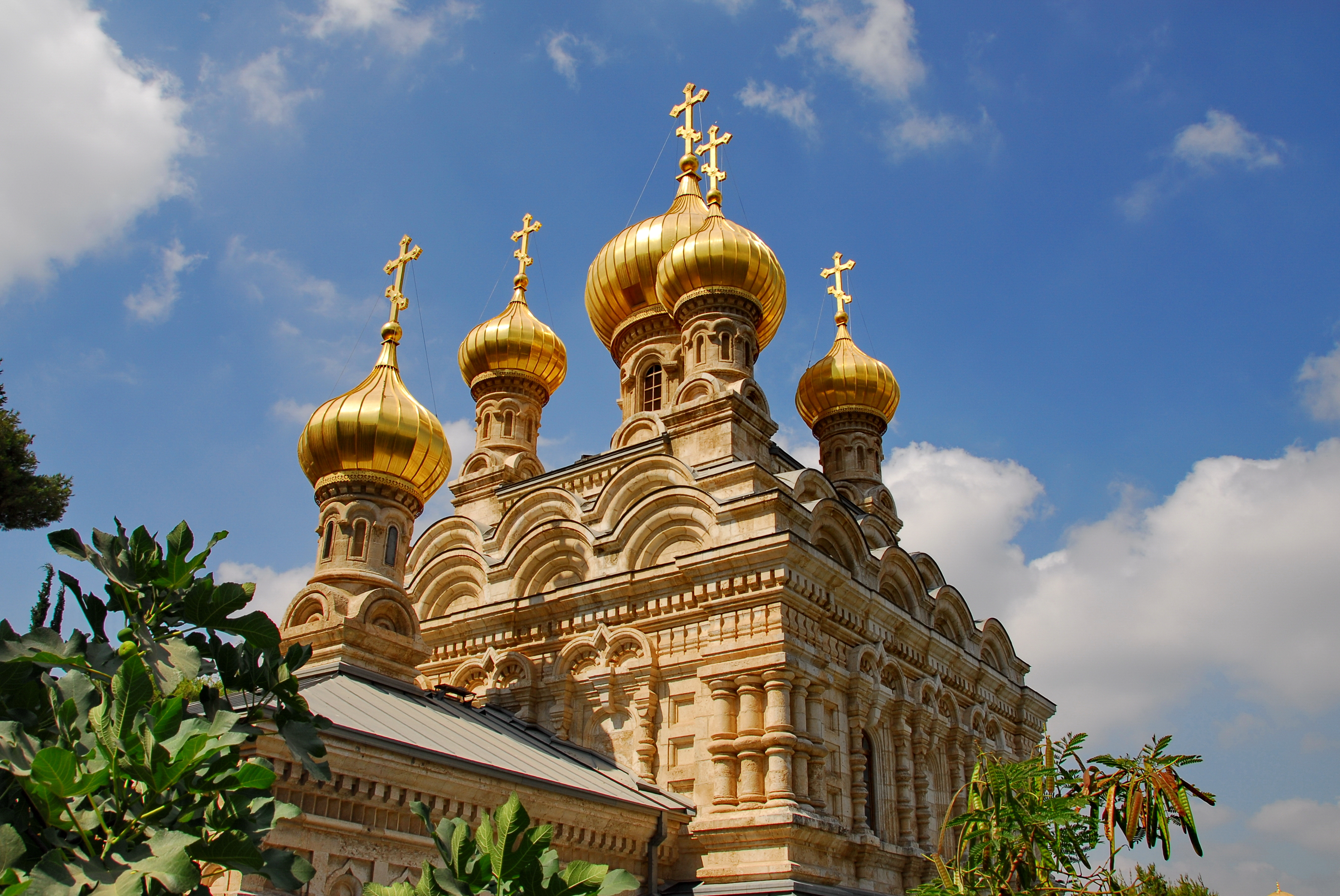 כנסיית מריה מגדלנה היא כנסייה רוסית השוכנת על מורדותיו המערביים של הר הזיתים בירושלים. היא מוקדשת למרים המגדלית, תלמידתו של ישו שהלכה אחריו בדרכו לצליבה, והייתה הראשונה לראותו לאחר שקם לתחייה.